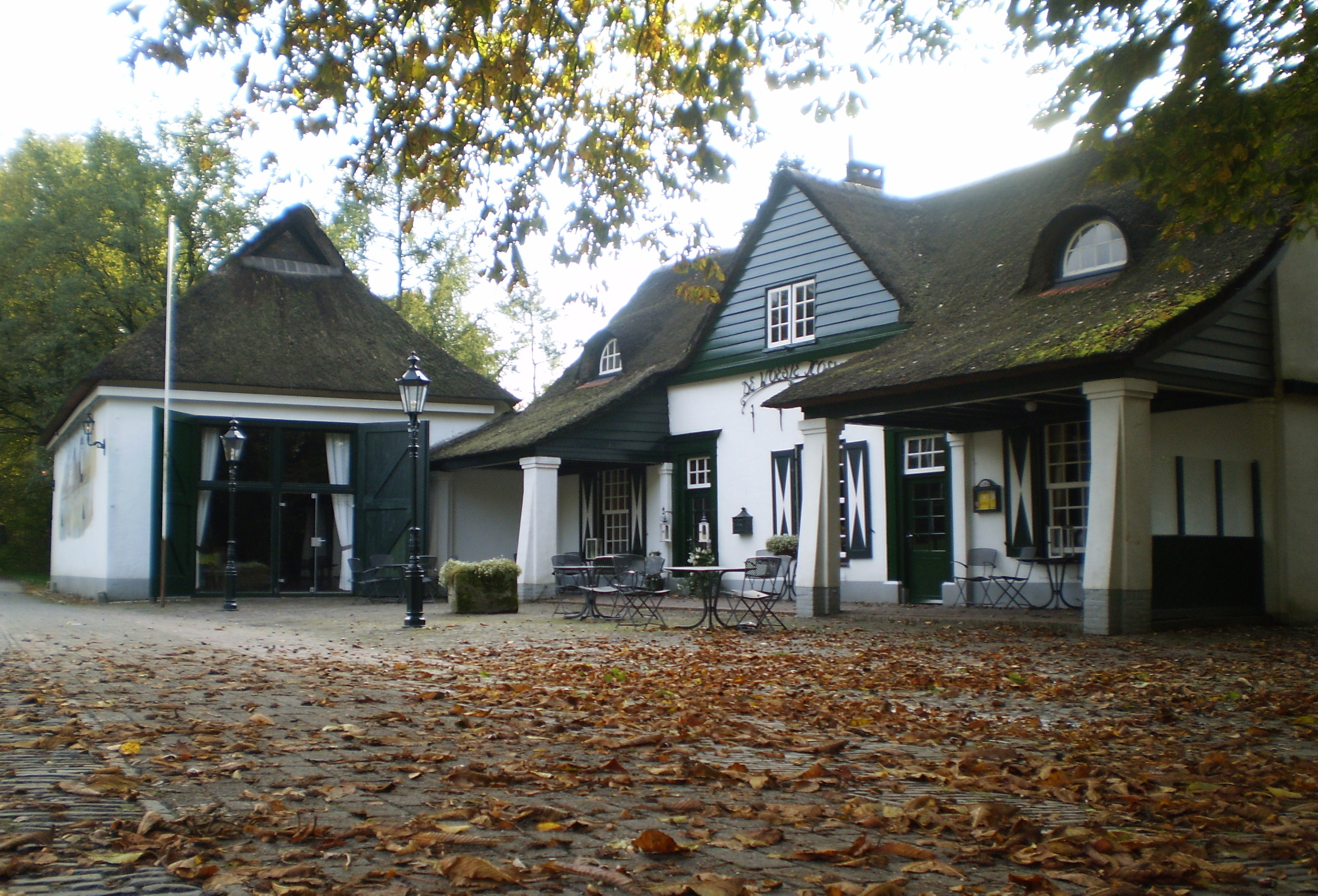 Restaurant "De Woeste Hoeve", gemeente Apeldoorn, NL